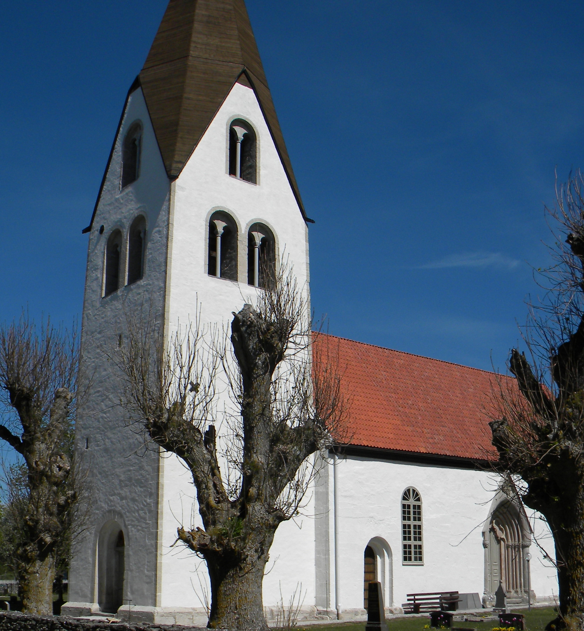 Eksta kyrka, Gotland